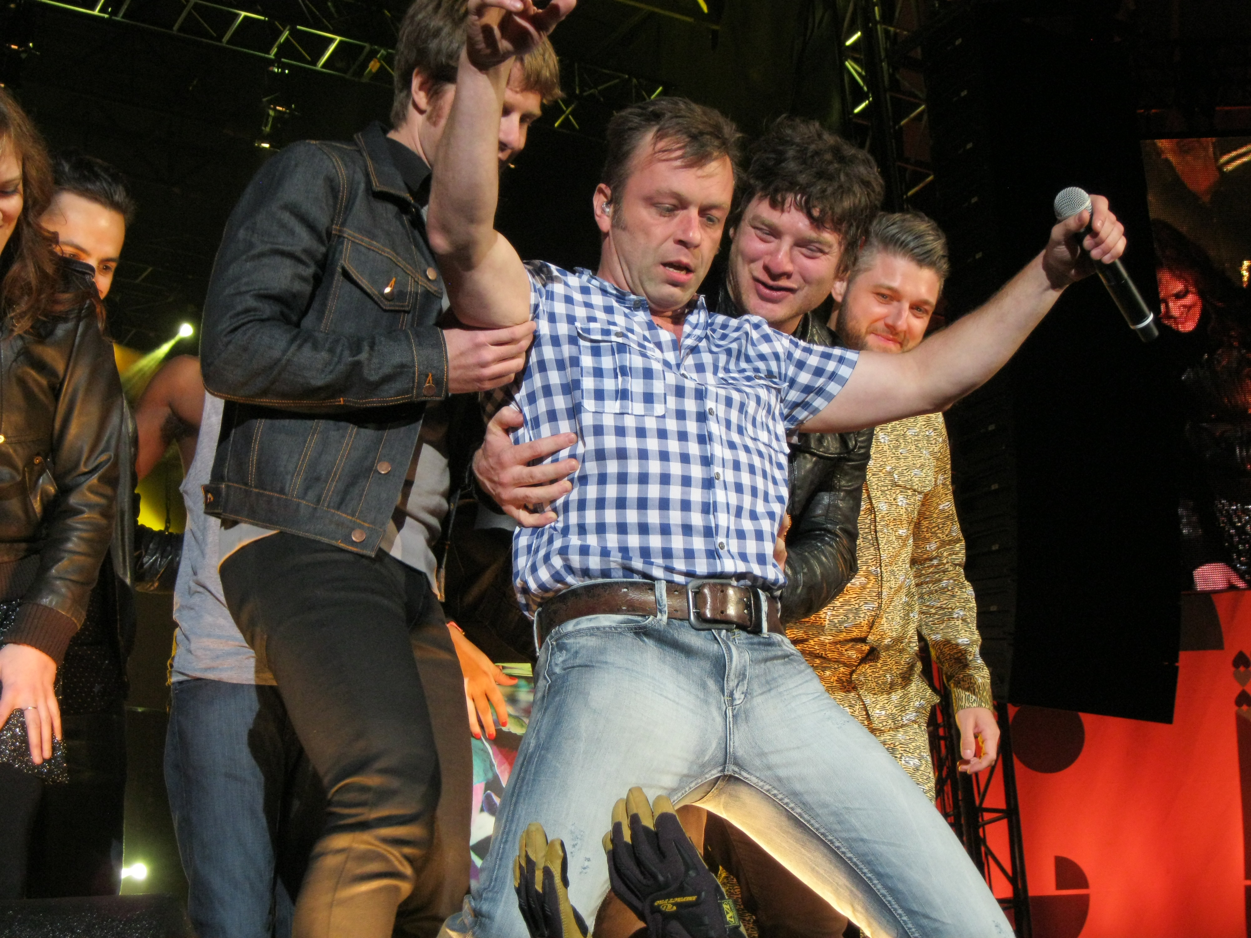 Pour célébrer les 25 ans des FrancoFolies de Montréal, le président, Alain Simard, a eu l'idée de réunir 25 artistes (ou groupes) qui chanteraient chacun LA chanson de leur répertoire la plus connue du public. Le spectacle a eu lieu lundi le 17 juin 2013 à partir de 21:00 à la place des Festivals. Dans l'ordre, sont apparus : Karim Ouellet, Ariane Moffatt, Richard Séguin, Corneille, Lisa LeBlanc, Daniel Lavoie, Mara Tremblay, Mes Aïeux, Luc De Larochelière, Dumas, Isabelle Boulay, Yann Perreau, Laurence Jalbert, Stefie Shock, Michel Rivard, Pierre Lapointe, Dan Bigras, Paul Piché, Vincent Vallières, Les Respectables, Damien Robitaille, Loco Locass, Daniel Boucher, Marjo et Éric Lapointe.